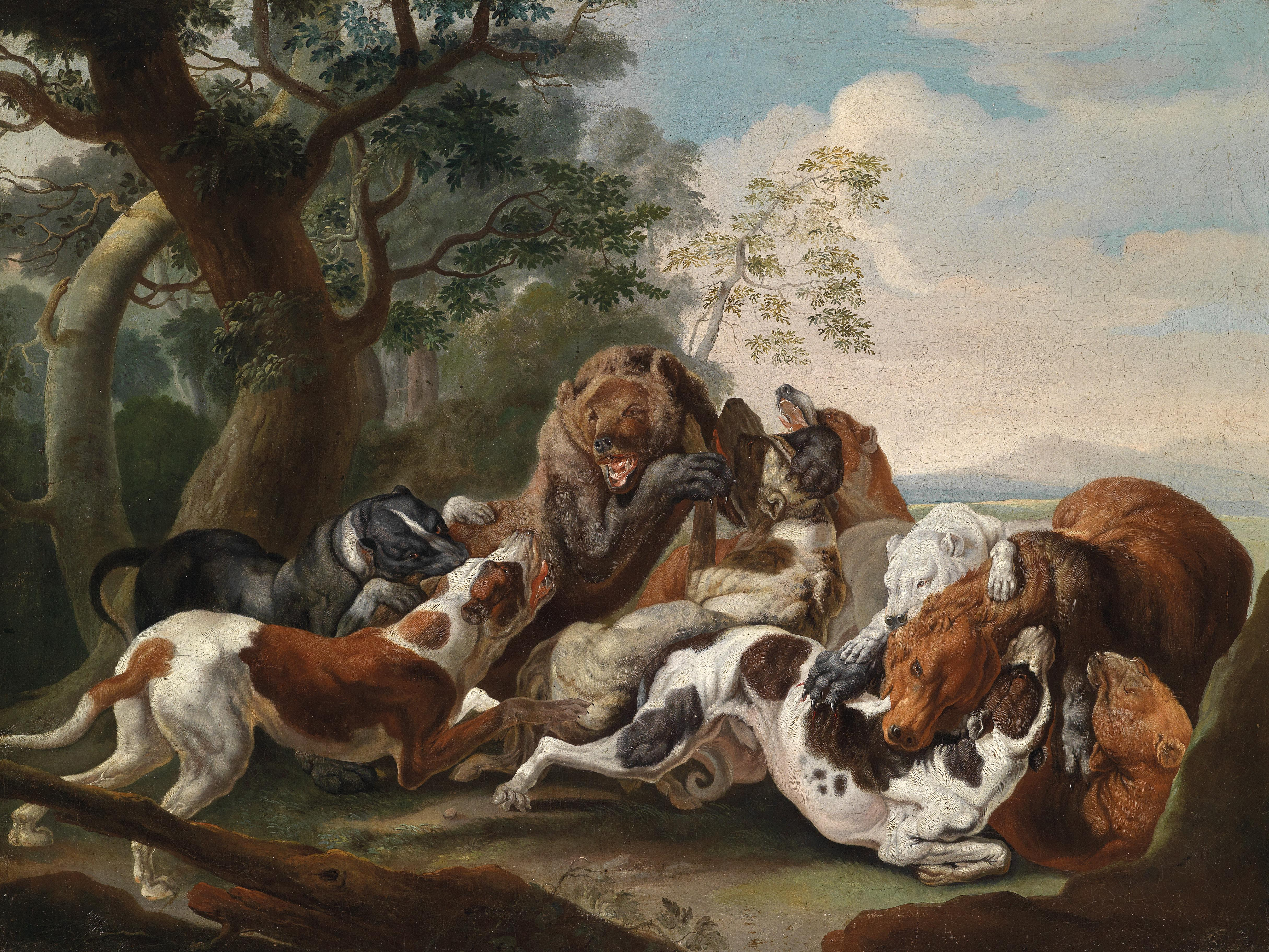 Bärenhatz, Öl auf Leinwand, 69 x 92 cm